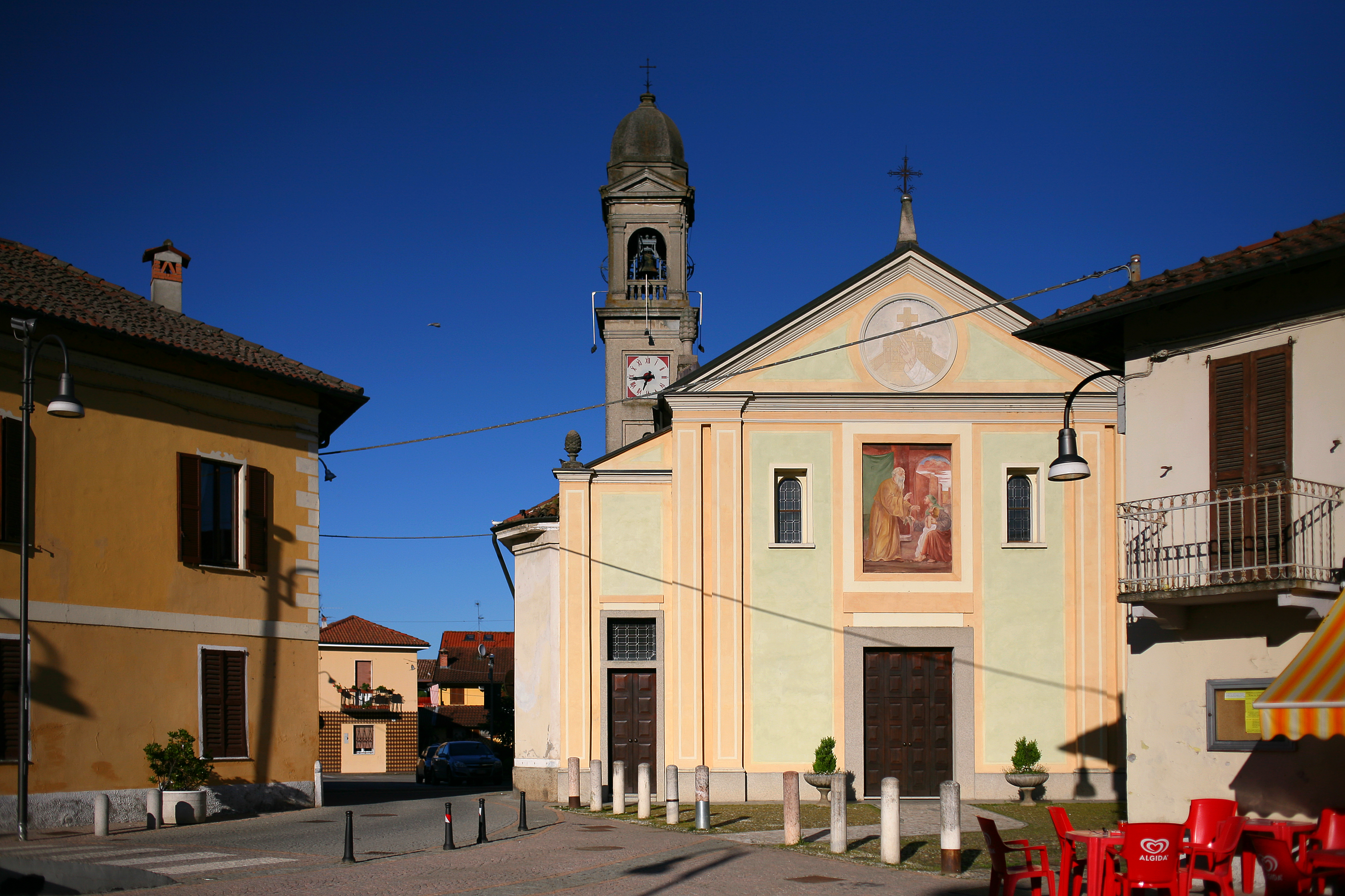 La chiesa parrocchiale di San Biagio a Trovo, Pavia